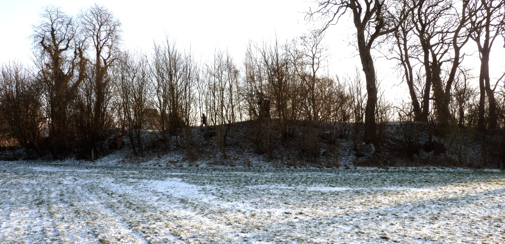 Det gamle voldsteds vold går i dag i en bue nord om præstegårdshaven og ned til stien ved nordenden af Pedersborg Sø.